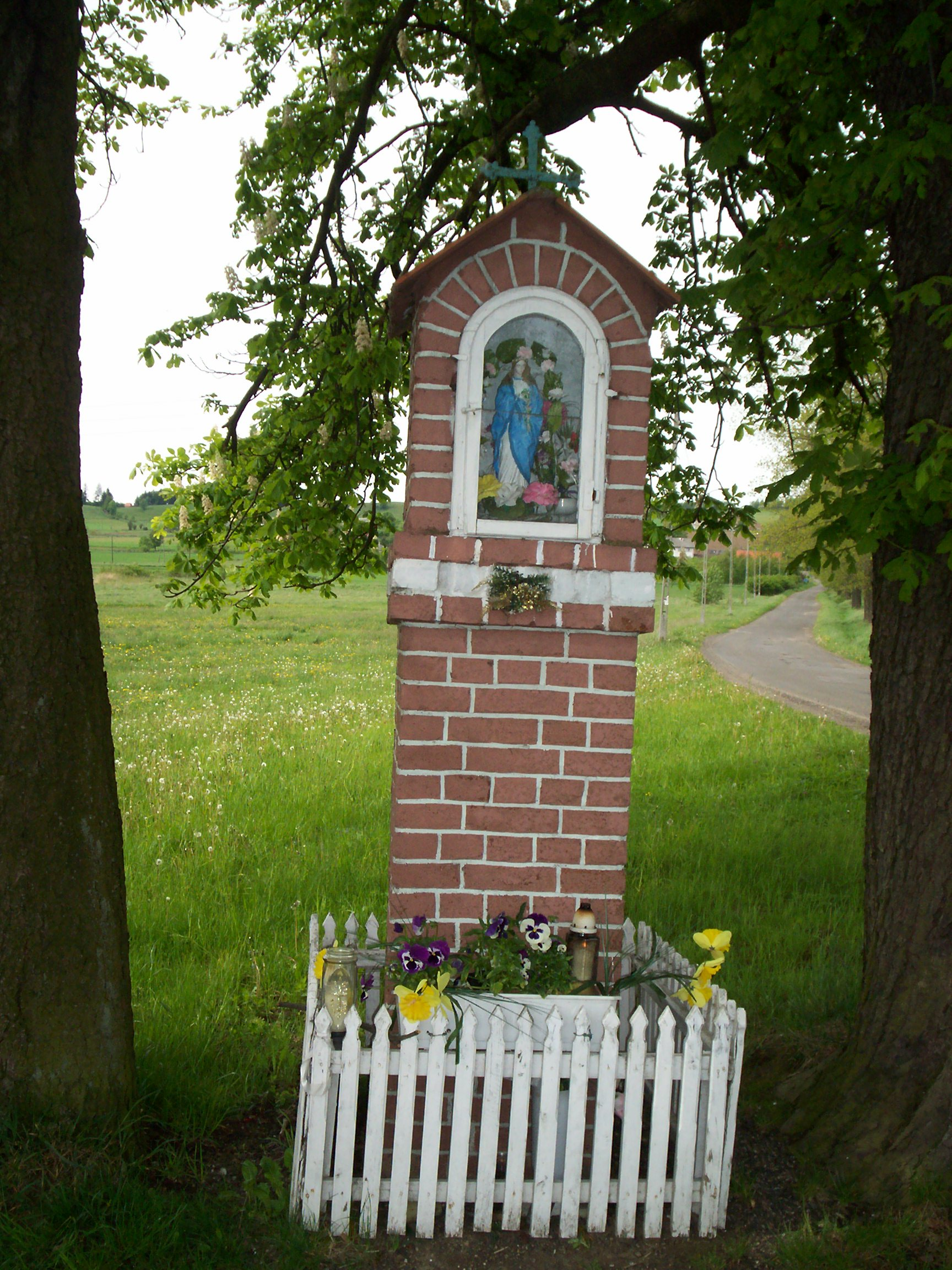 Borówno, przydrożna kapliczka.